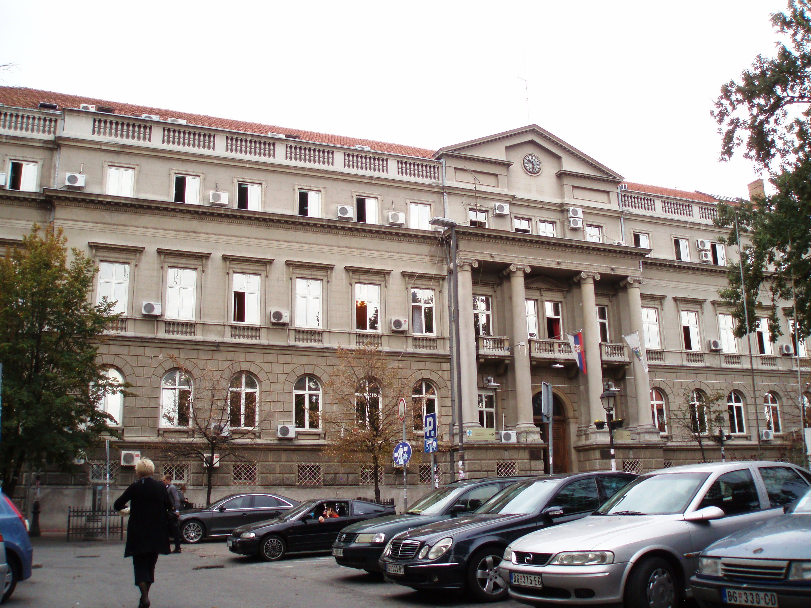 Magistratski trg, zgrada Opštine, autor fotografije: Nicolo